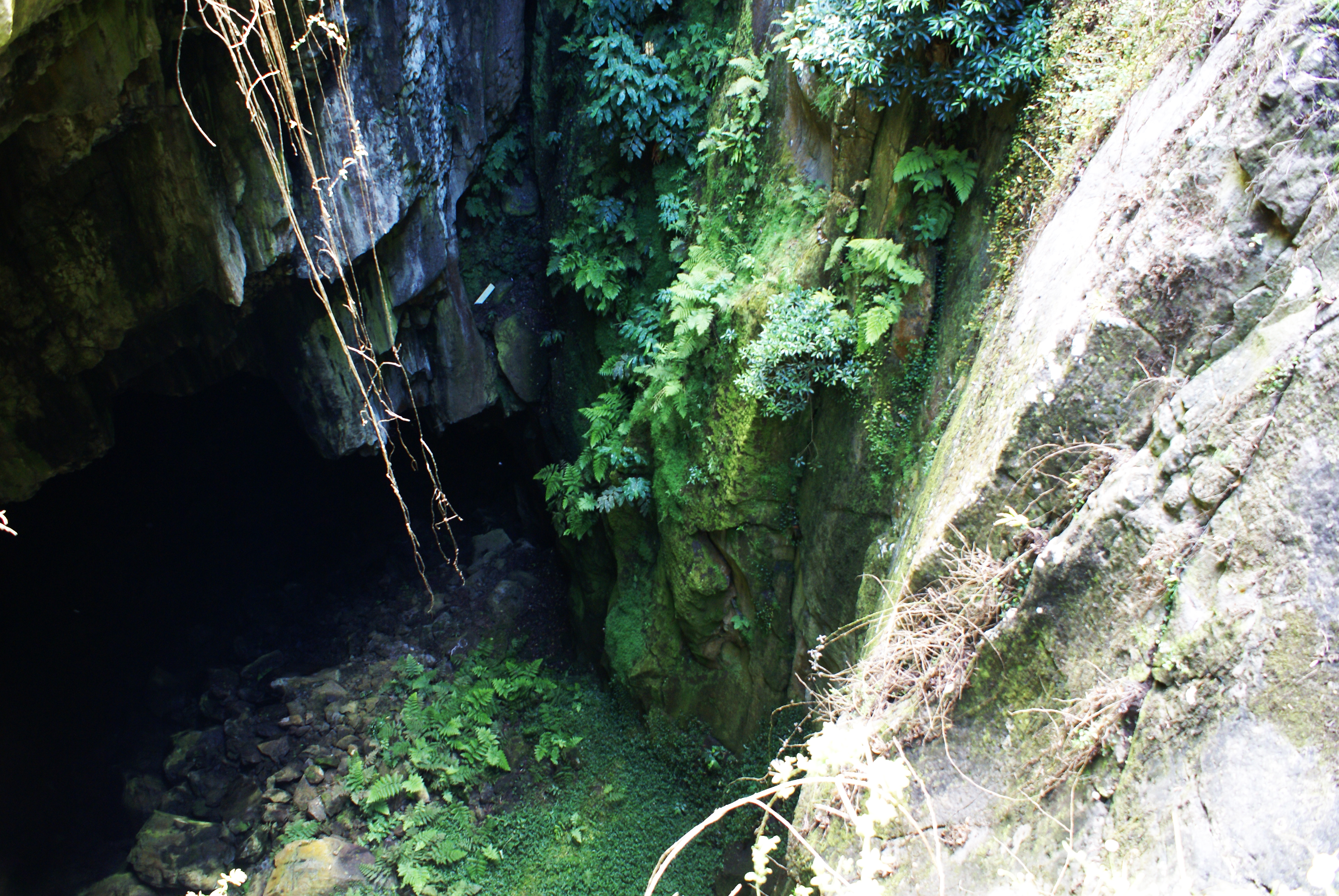 Furna do Enxofre, Entrada, ilha Graciosa, Açores, Portugal